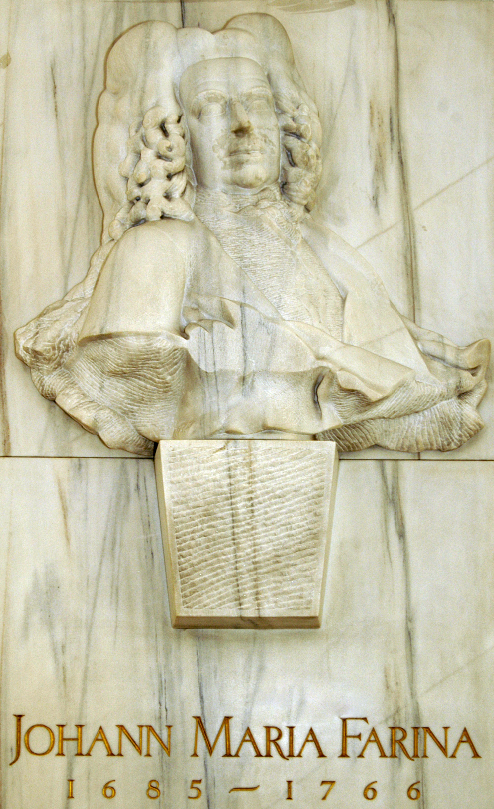 Johann Maria Farina Marmor Büste, von Wolfgang Reuter